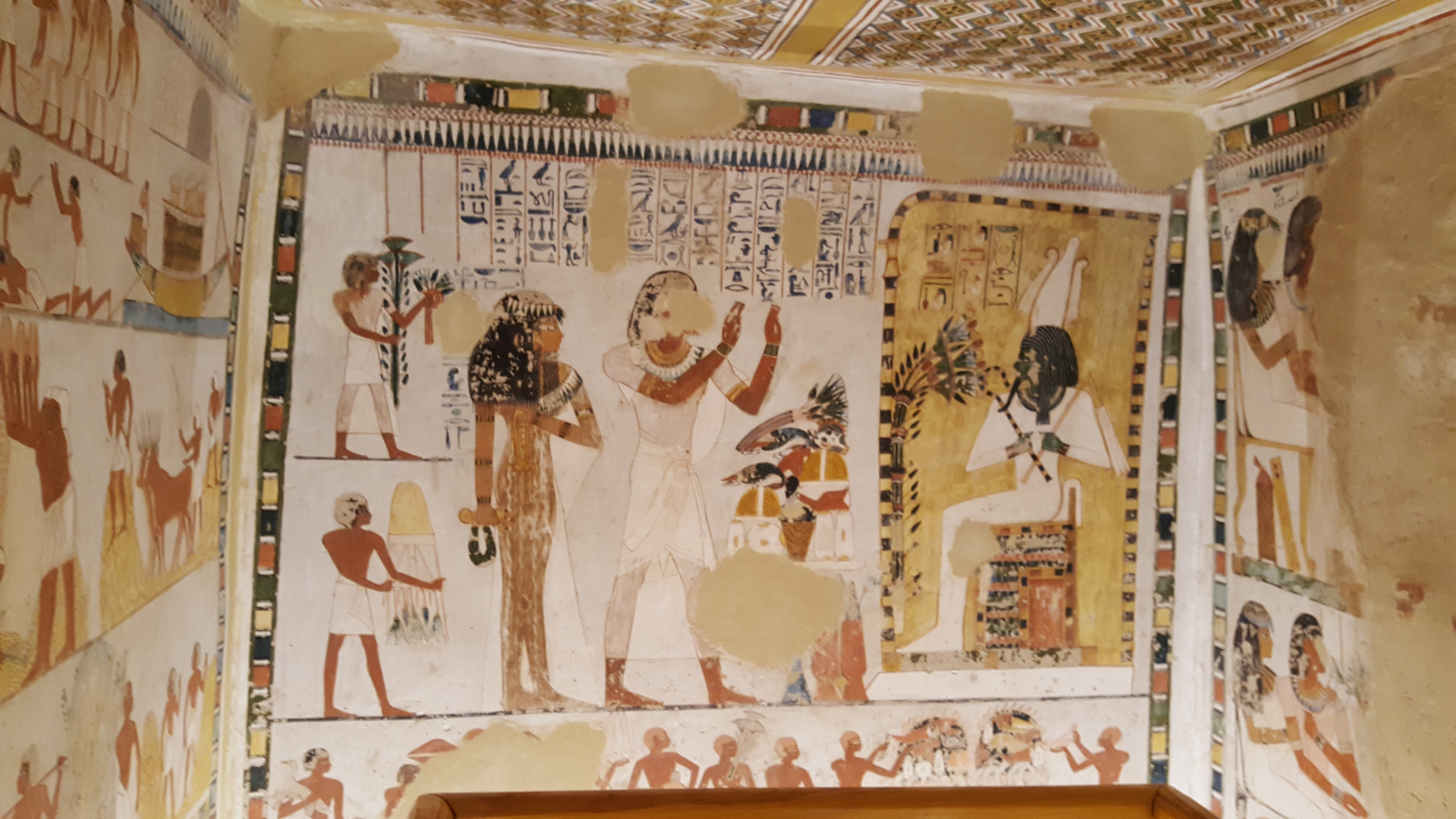 Tomb of Menna